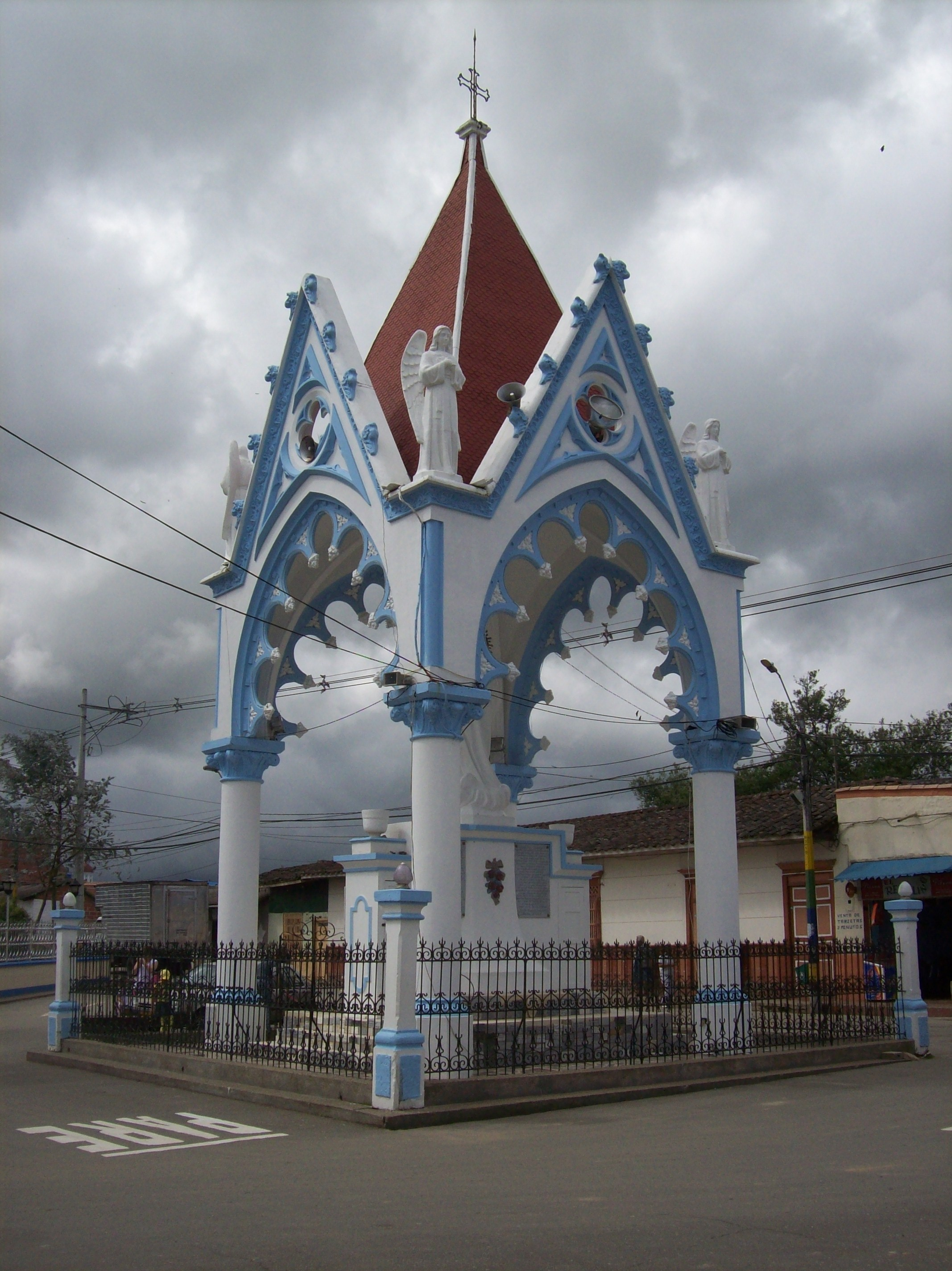 Basílica Menor de Nuestra Señora de las Misericordias en el Municipio de Santa Rosa de Osos, Antioquia. Colombia.